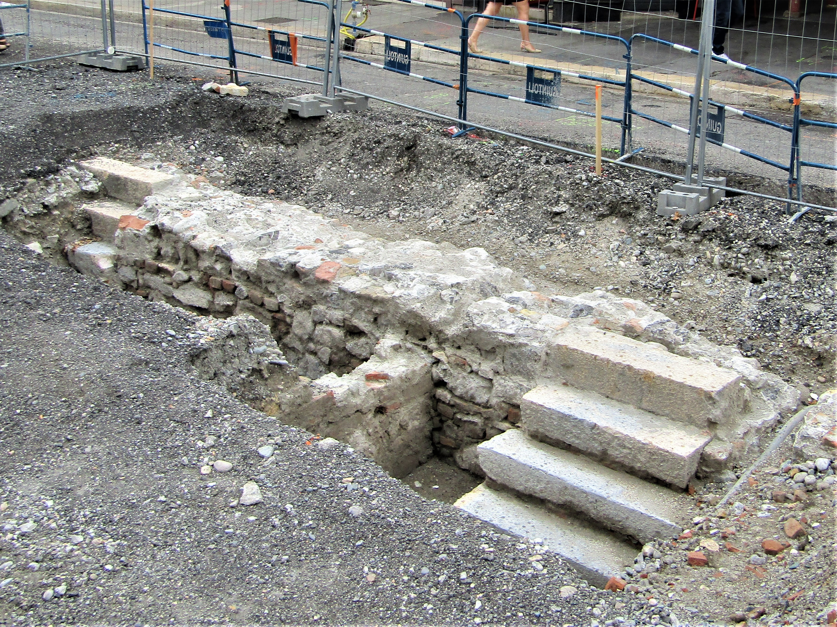 Fouilles de la rue de la République à Grenoble en Juin 2019